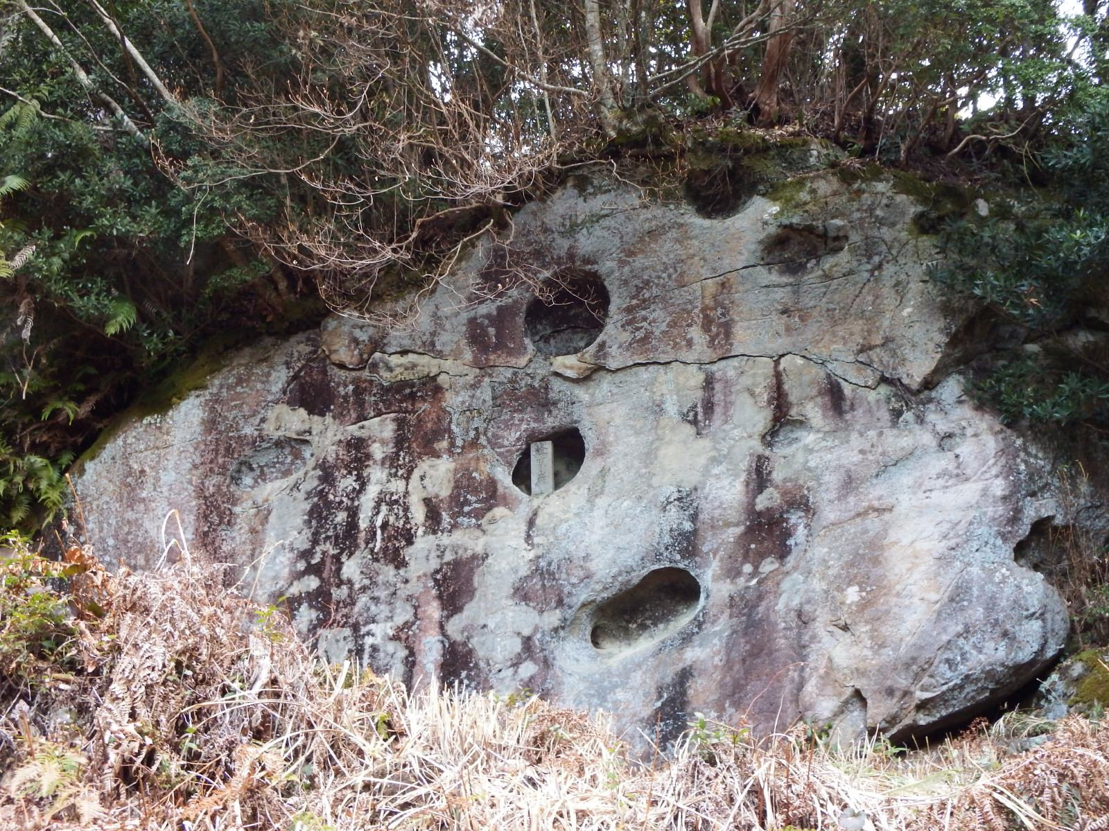 神峯神社の灯明巖